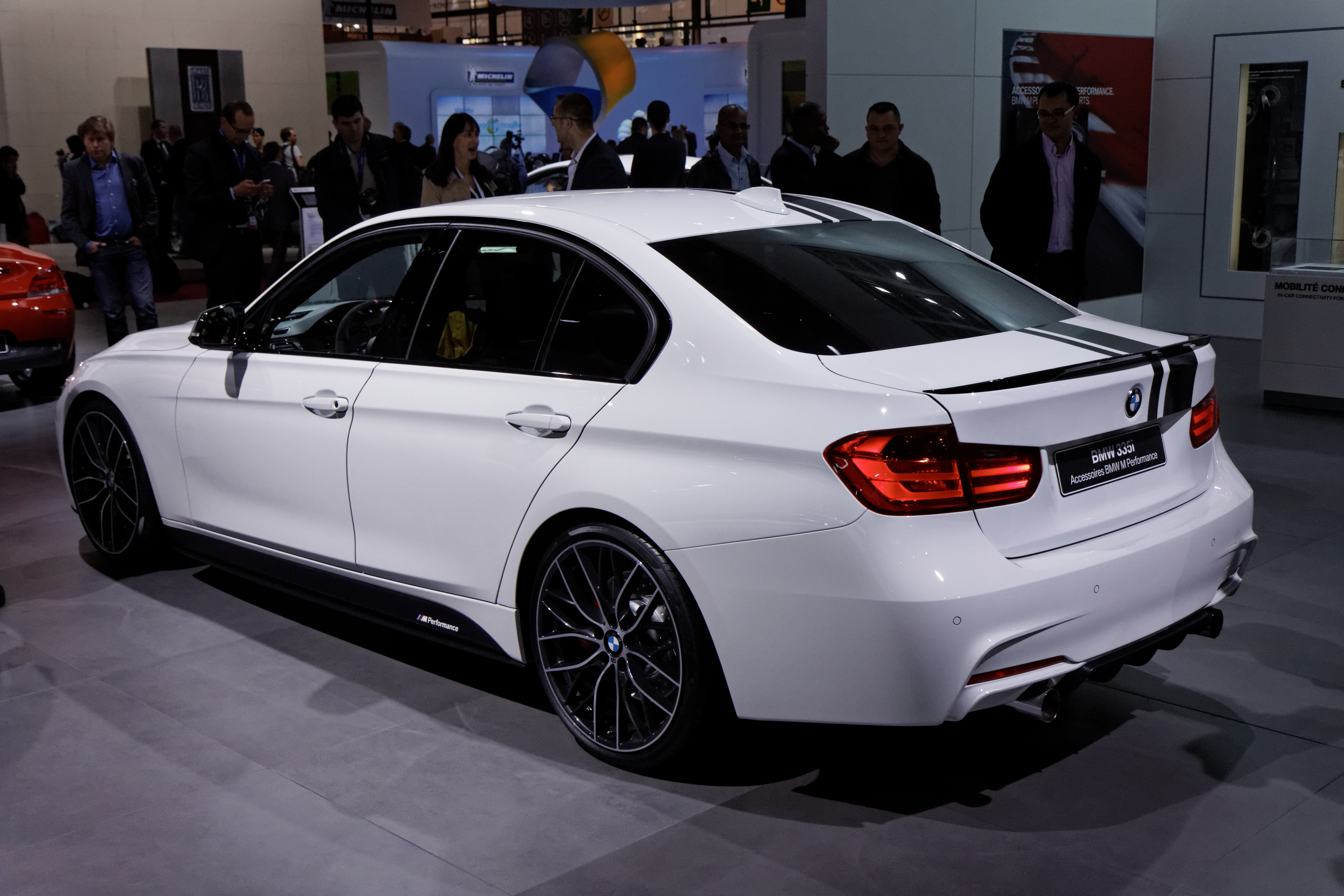 Une BMW 335i présentée lors du Mondial de l'automobile de Paris 2012.